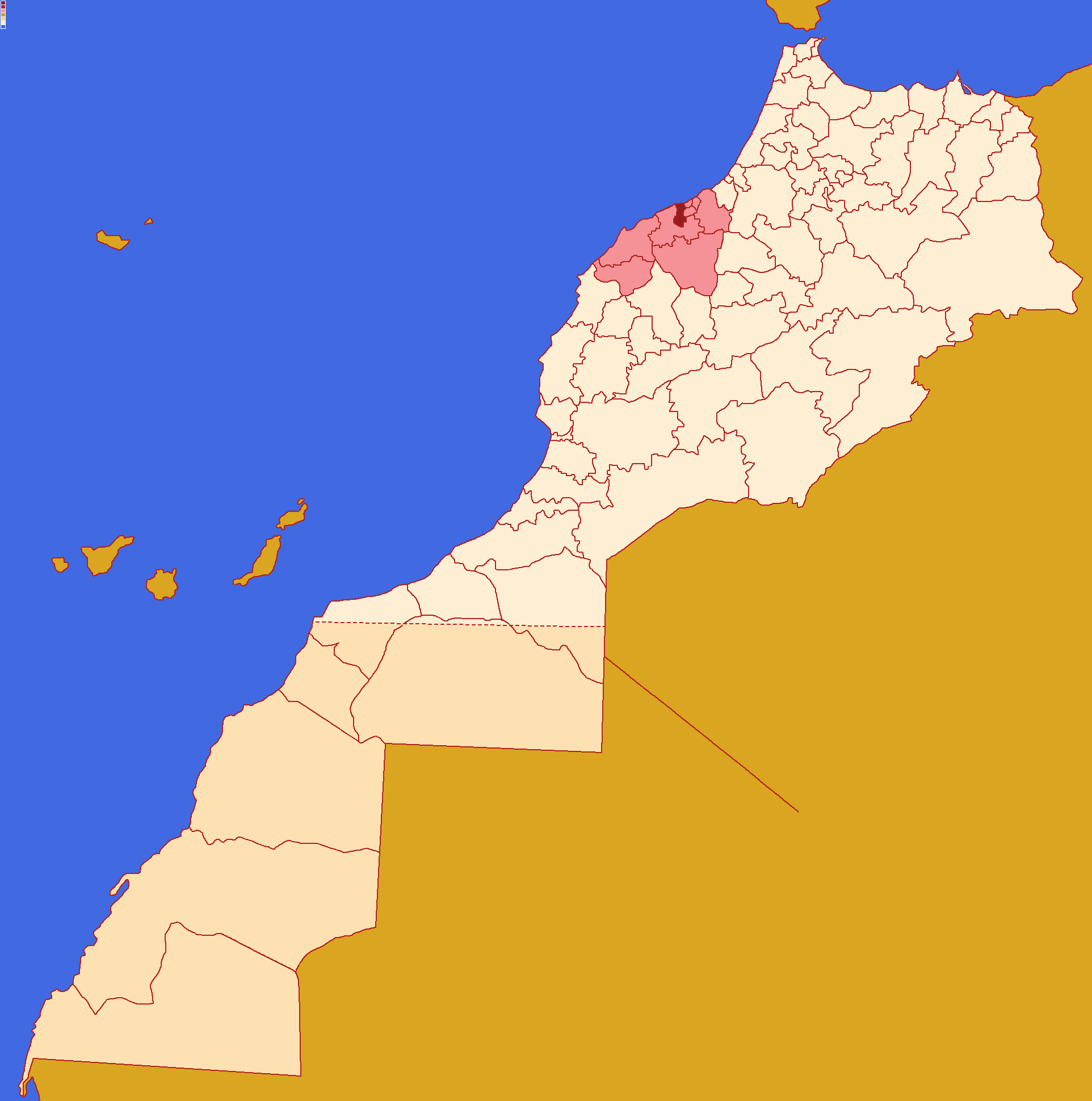 Localização da província de Nouaceur , dentro da região de Casablanca-Settat e dentro de Marrocos. Conforme a reforma administrativa de 2015.